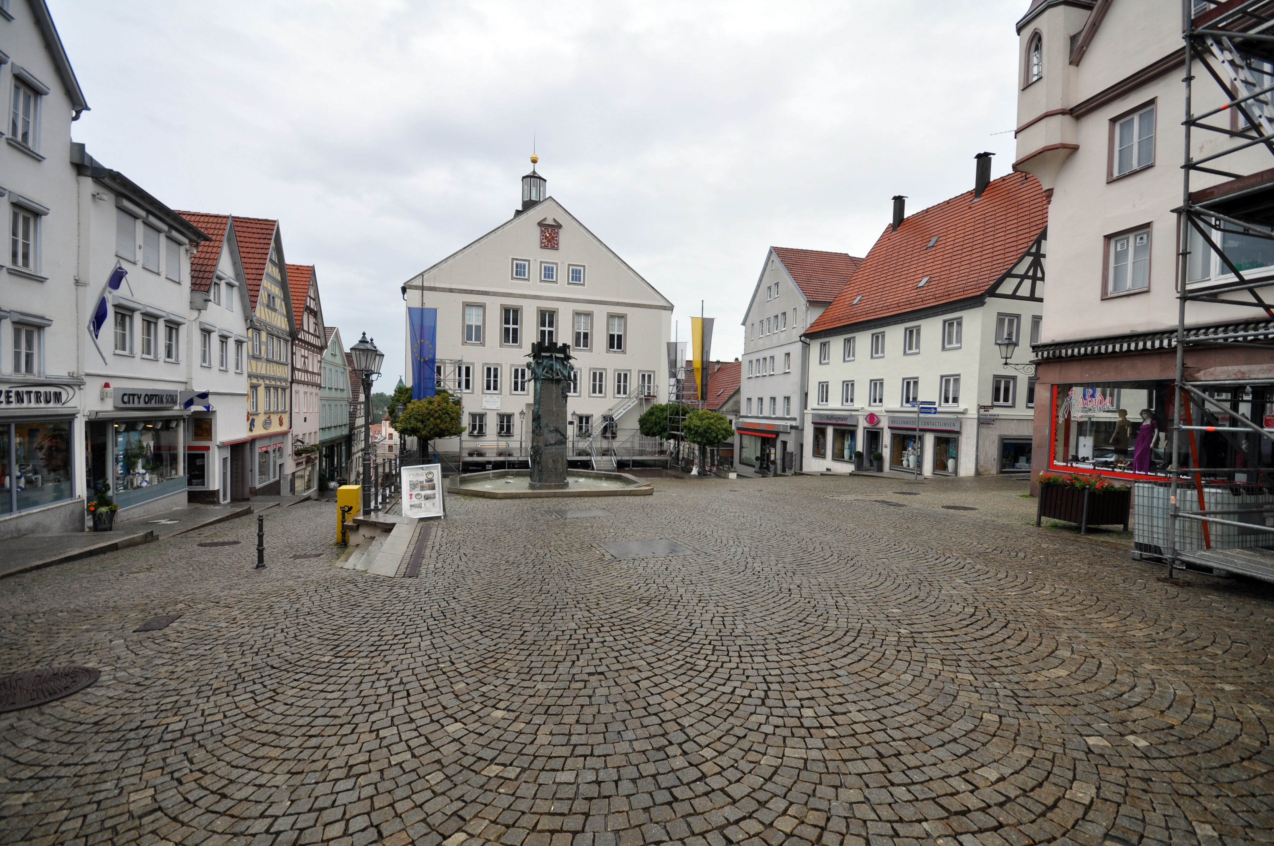 Hechingen